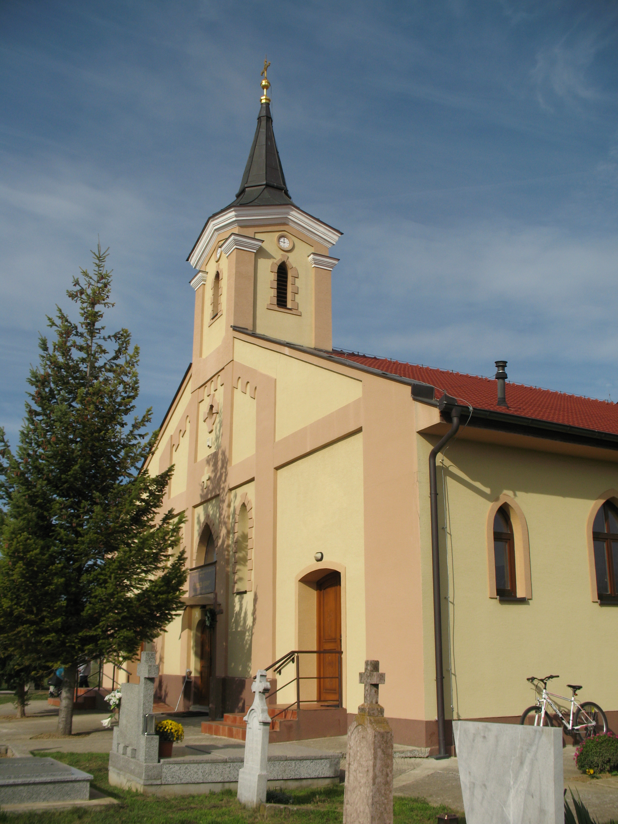 Bábindal